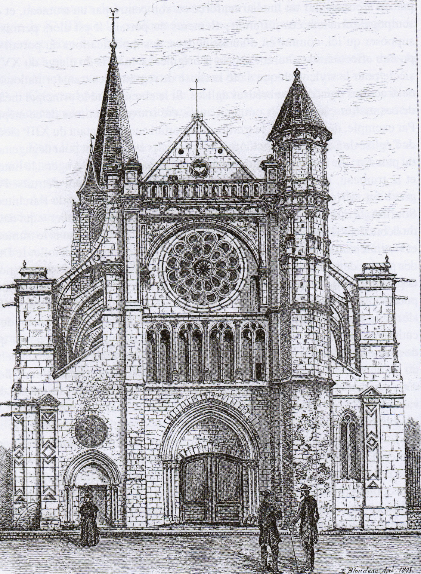 Eglise de Brie Comte Robert